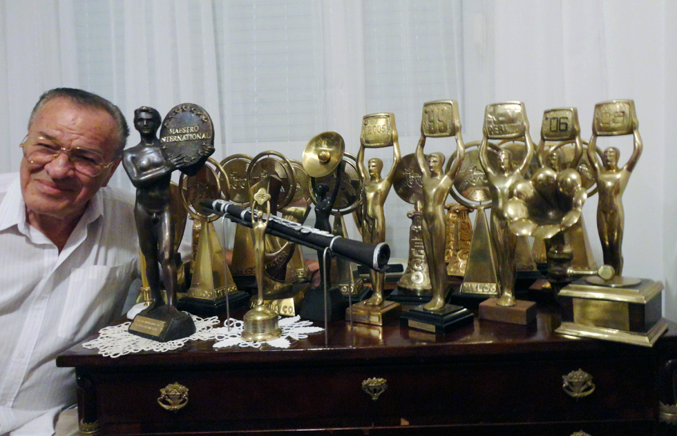 Srpskohrvatski / српскохрватски: Prof. i Mr Božidar Milošević kraj svojih mnogobrojnih trofeja osvojenih vrednim, predanim i požrtvovanim radom u 65-ogodišnjem druženju sa klarinetom.